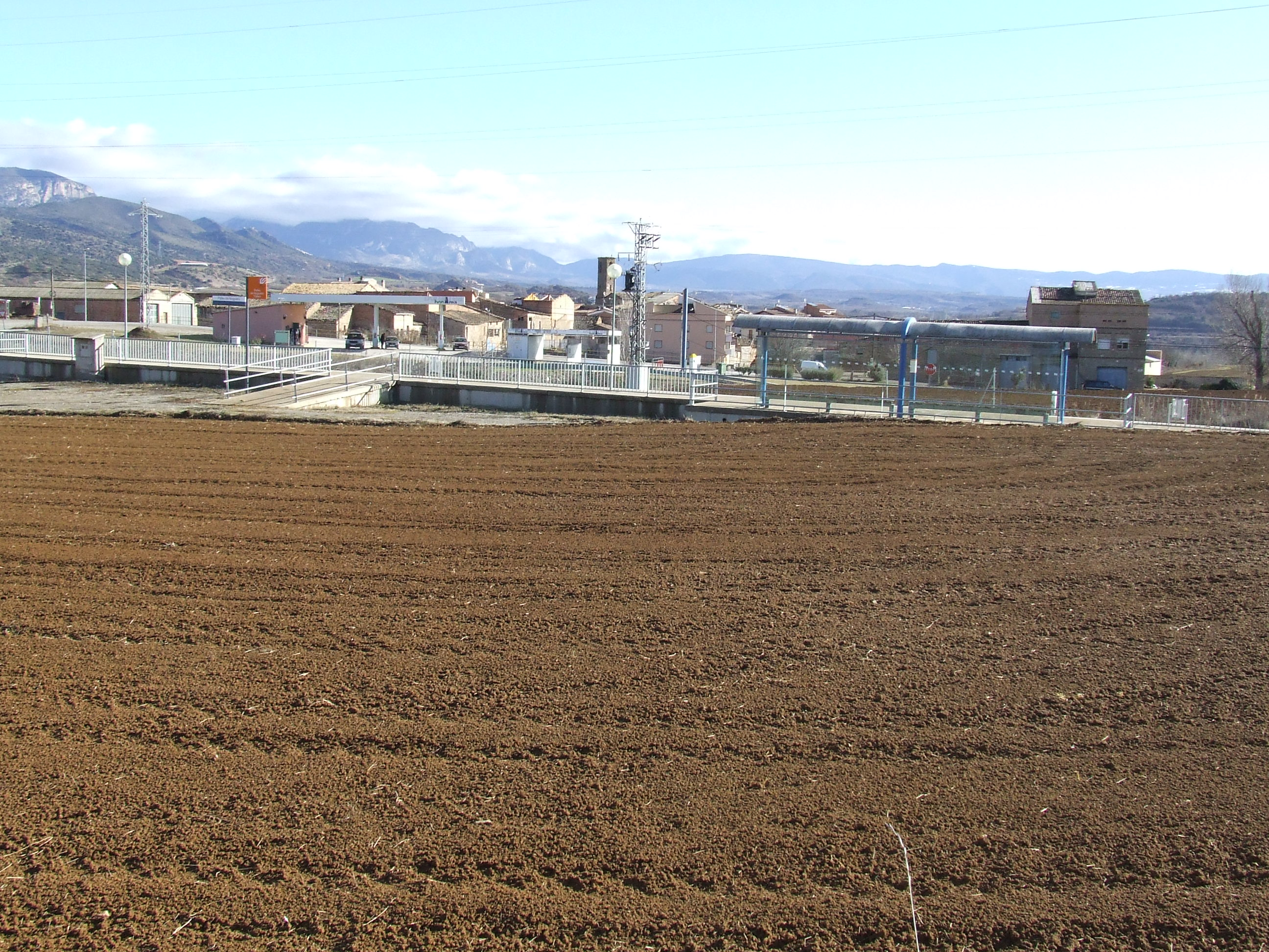 L'estació de Palau de Noguera amb el poble al fons (Palau de Noguera, Tremp, Pallars Jussà)